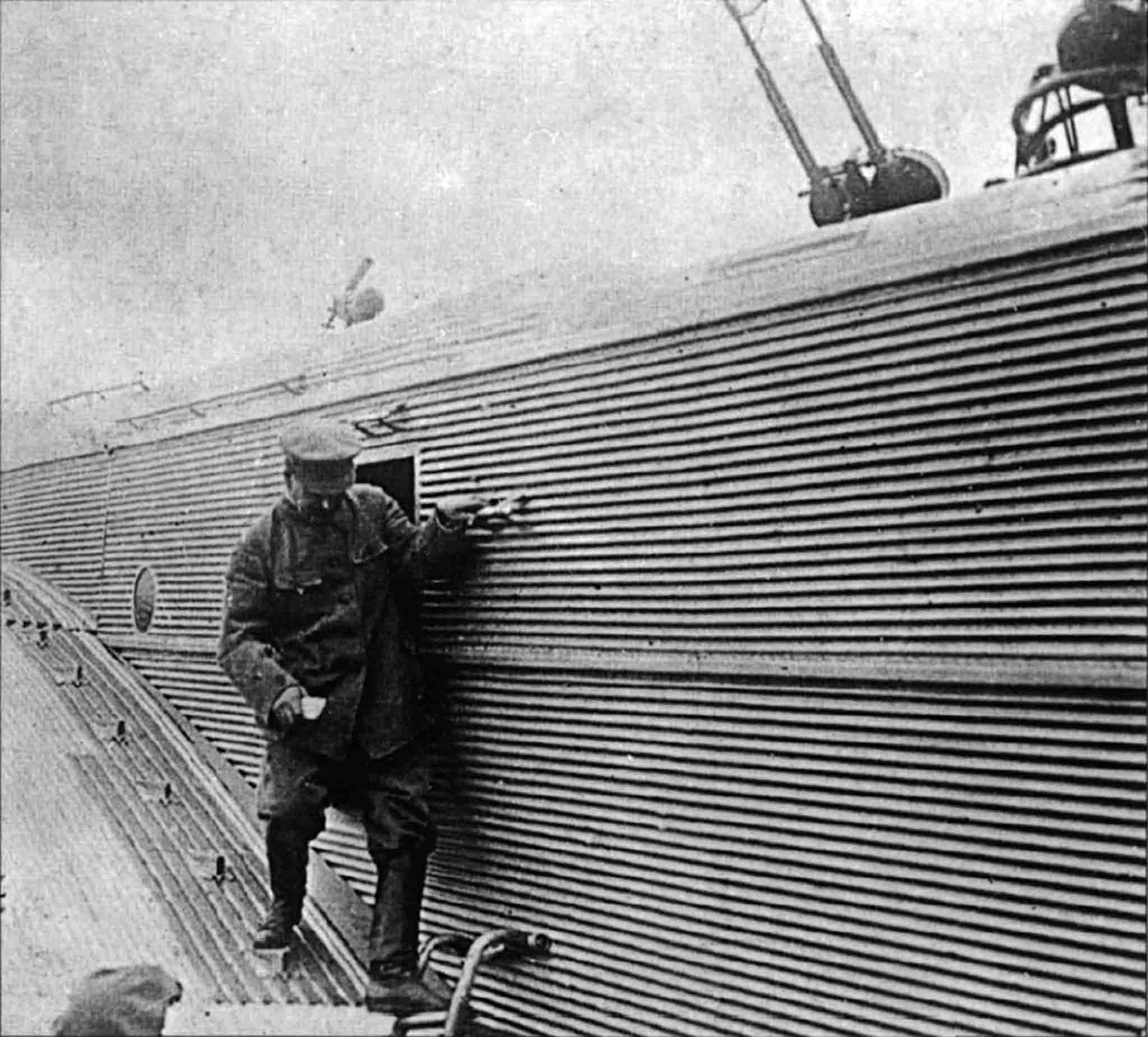 Иосиф Сталин осматривает тяжелый бомбардировщик ТБ‑3